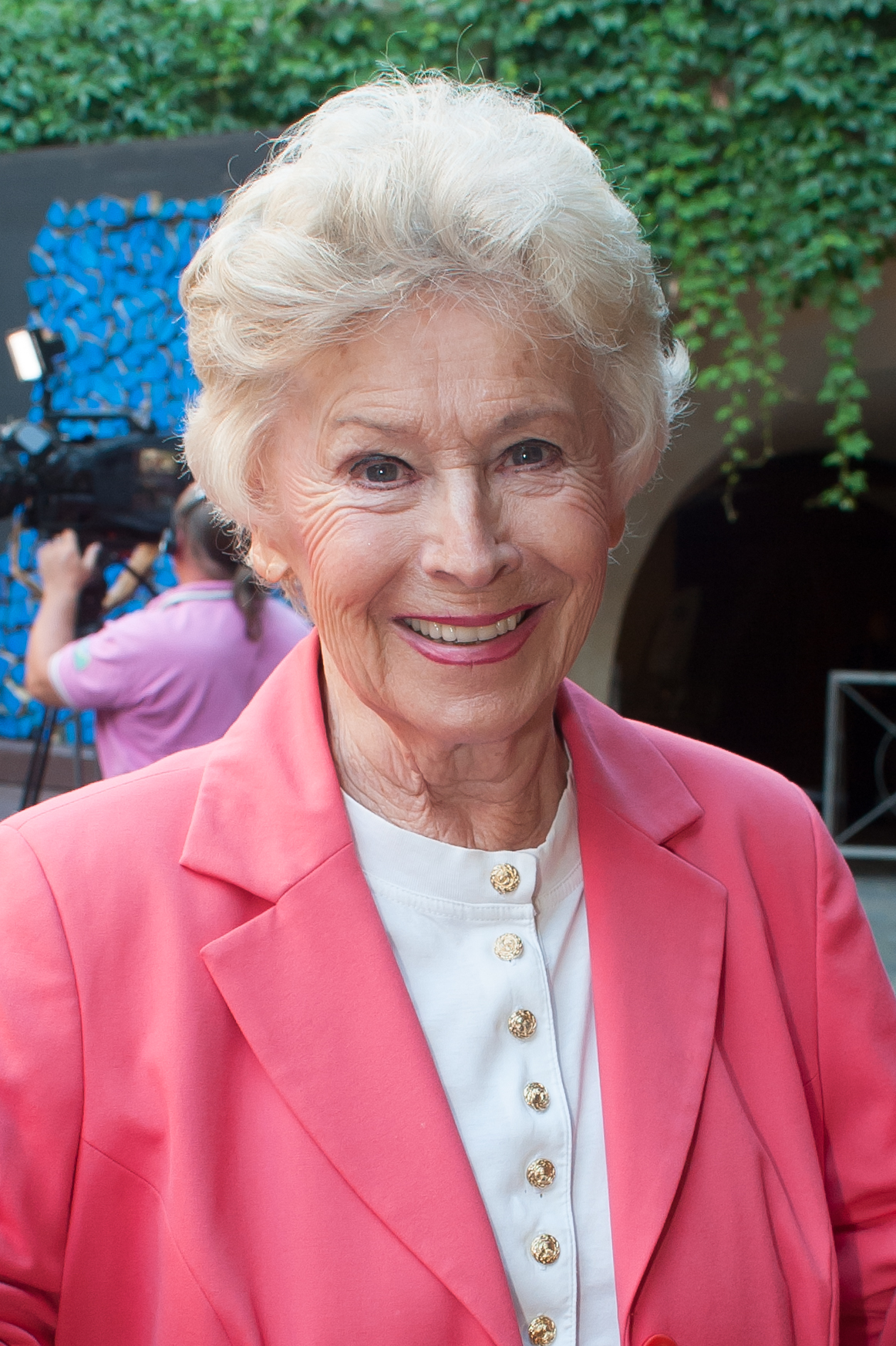 Wachaufestspiele Weißenkirchen: Premiere von „Der Brandner Kaspar und das ewig’ Leben“ am 19. Juli 2016 in Weißenkirchen. Bild zeigt Waltraut Haas.